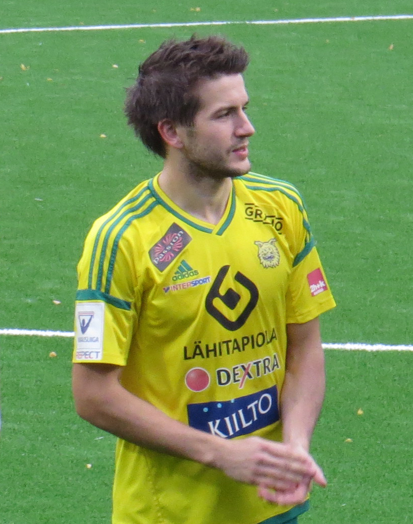 Eero Korte, suomalainen jalkapalloilija Tampereen Ilveksen joukkueessa kaudella 2015.